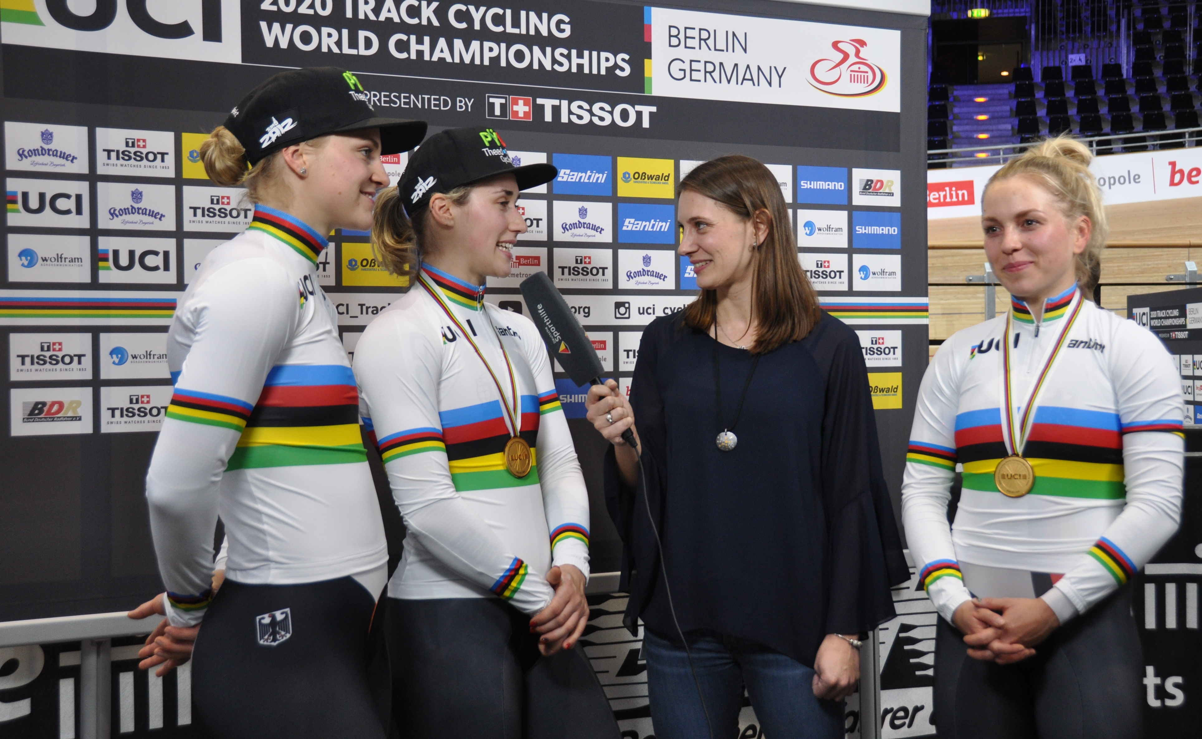 Weltmeisterinnen 2020 im Teamsprint im Interviews mit Miriam Welte (2.v.r.): Lea Sophie Friedrich, Pauline Grabosch, Emma Hinze (v.l.n.r.)